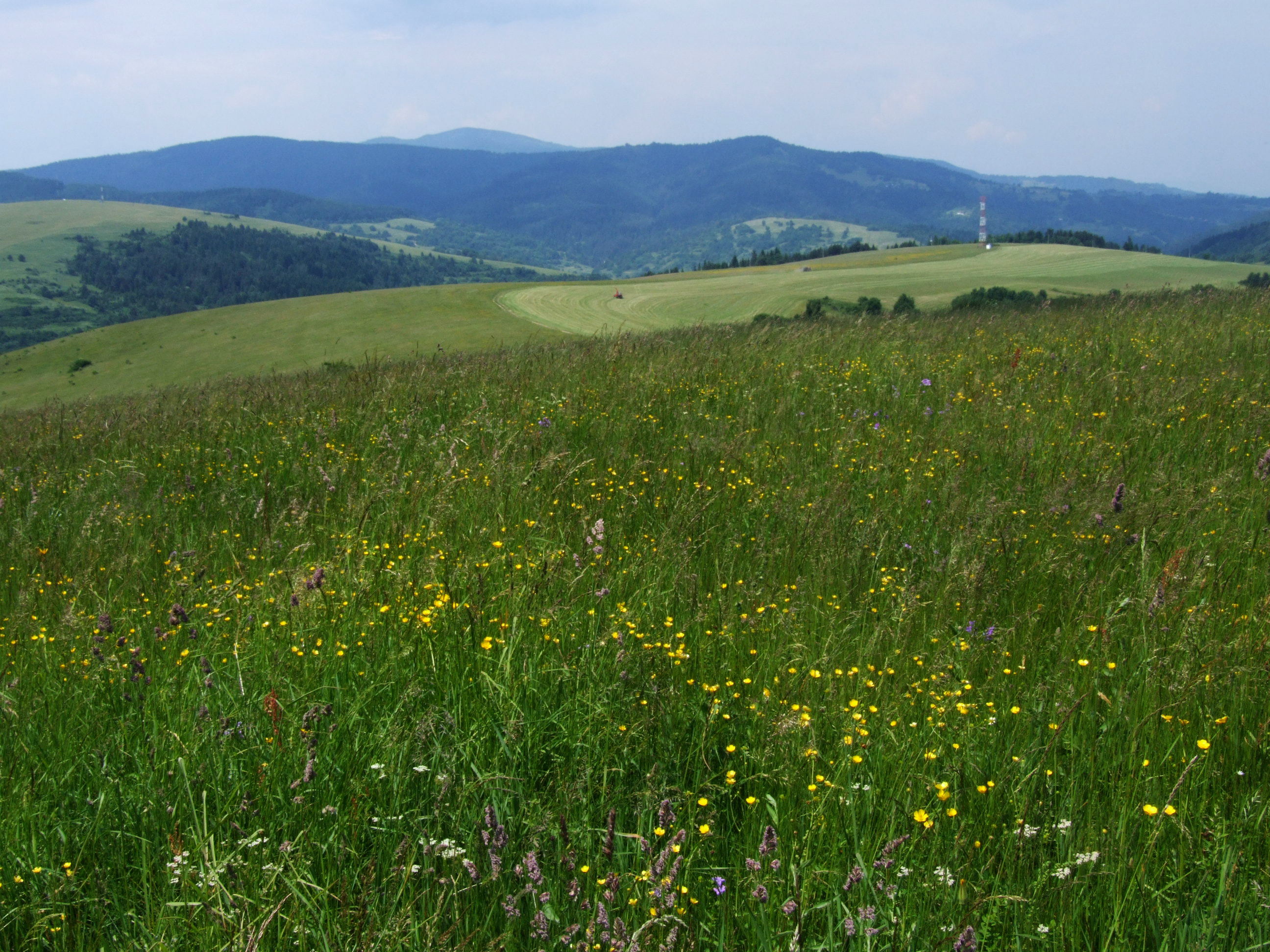 Widok z wzniesienia na grzbiecie Ośli Wierch - Wysoki Gruń